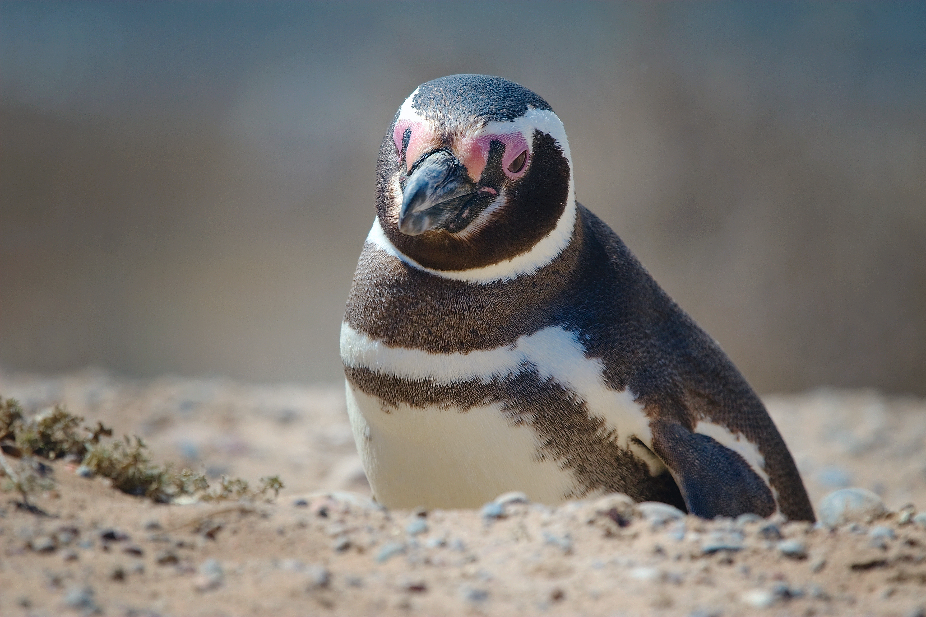 Magellanic penguin (Spheniscus magellanicus), Valdes Peninsula, Argentina